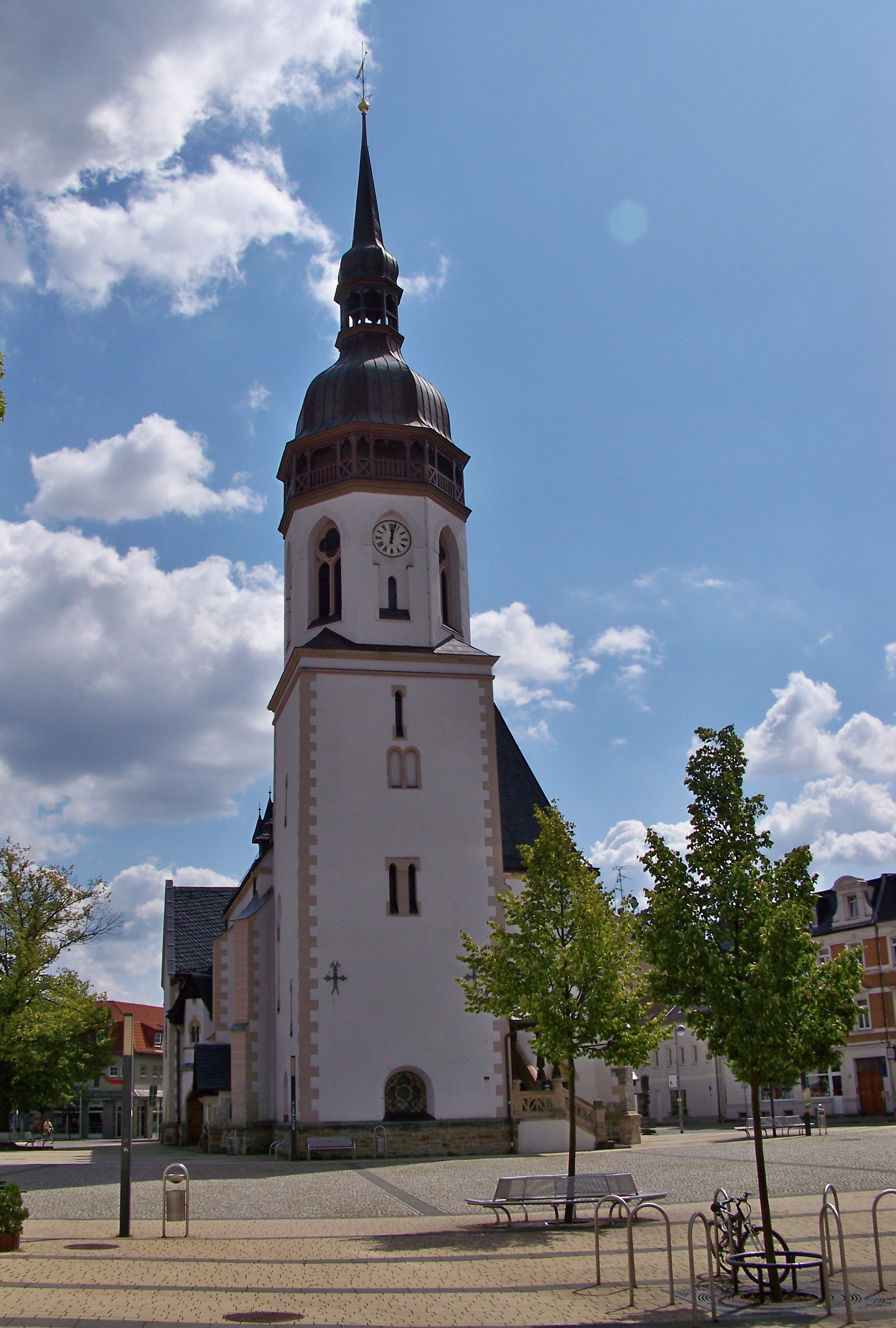 Kirche am Marktplatz in Markranstädt bei Leipzig